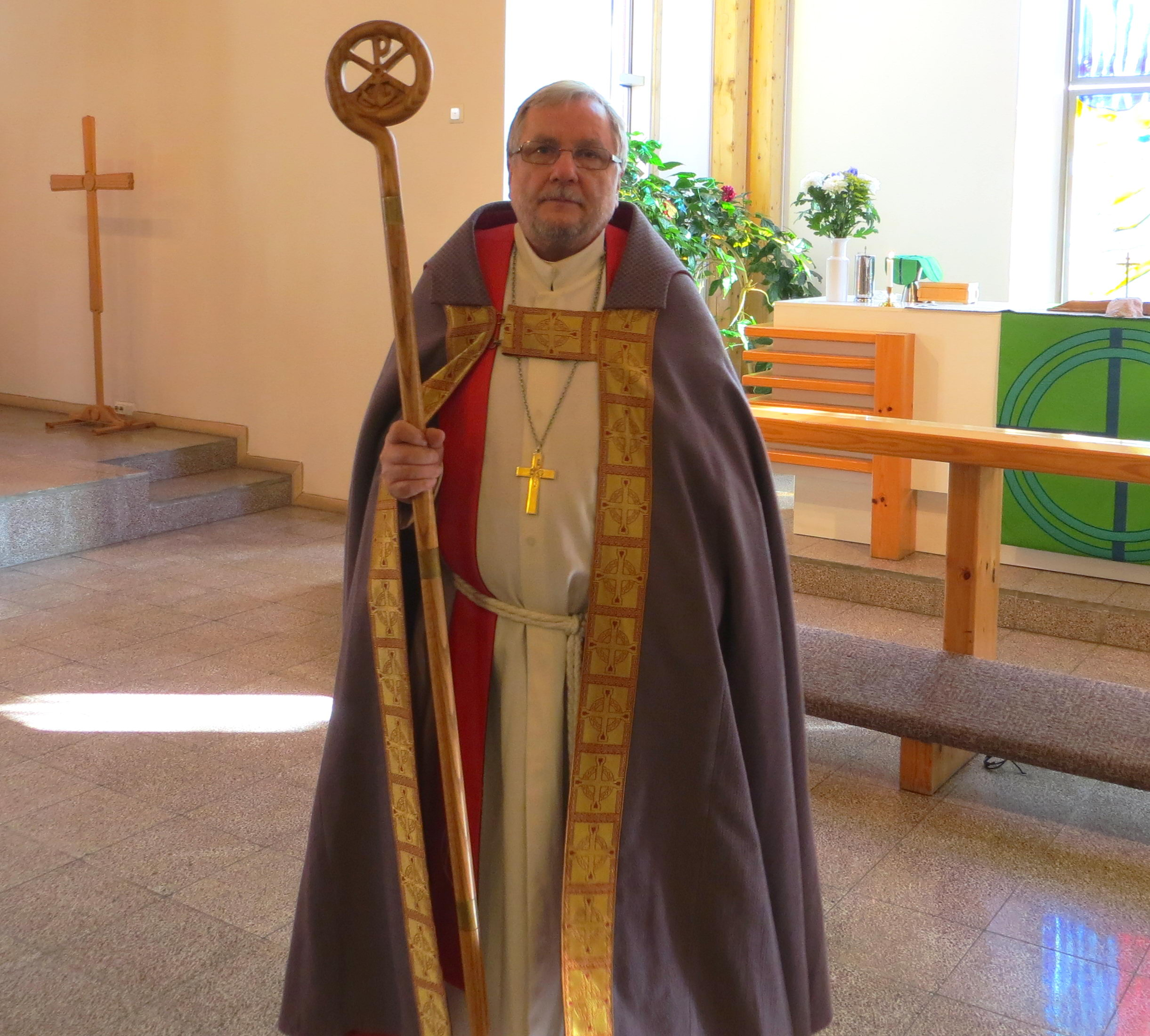 Арри Матвеевич Кугаппи, епископ Евангелическо-лютеранской церкви Ингрии.